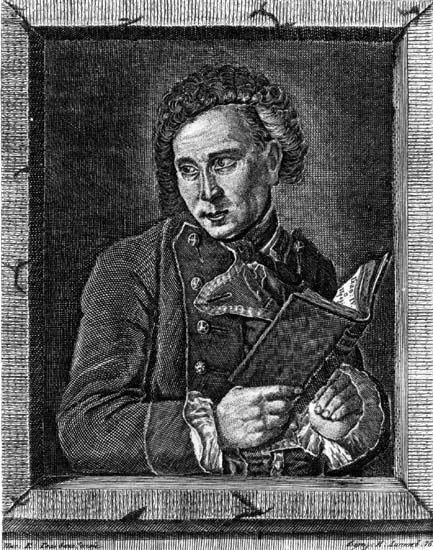 Шумский Яков Данилович. Морозов А.В. Каталог моего собрания русских гравированных и литографированных портретов. М., 1913, Т.4. стр. CDLXXII. Гравюра.